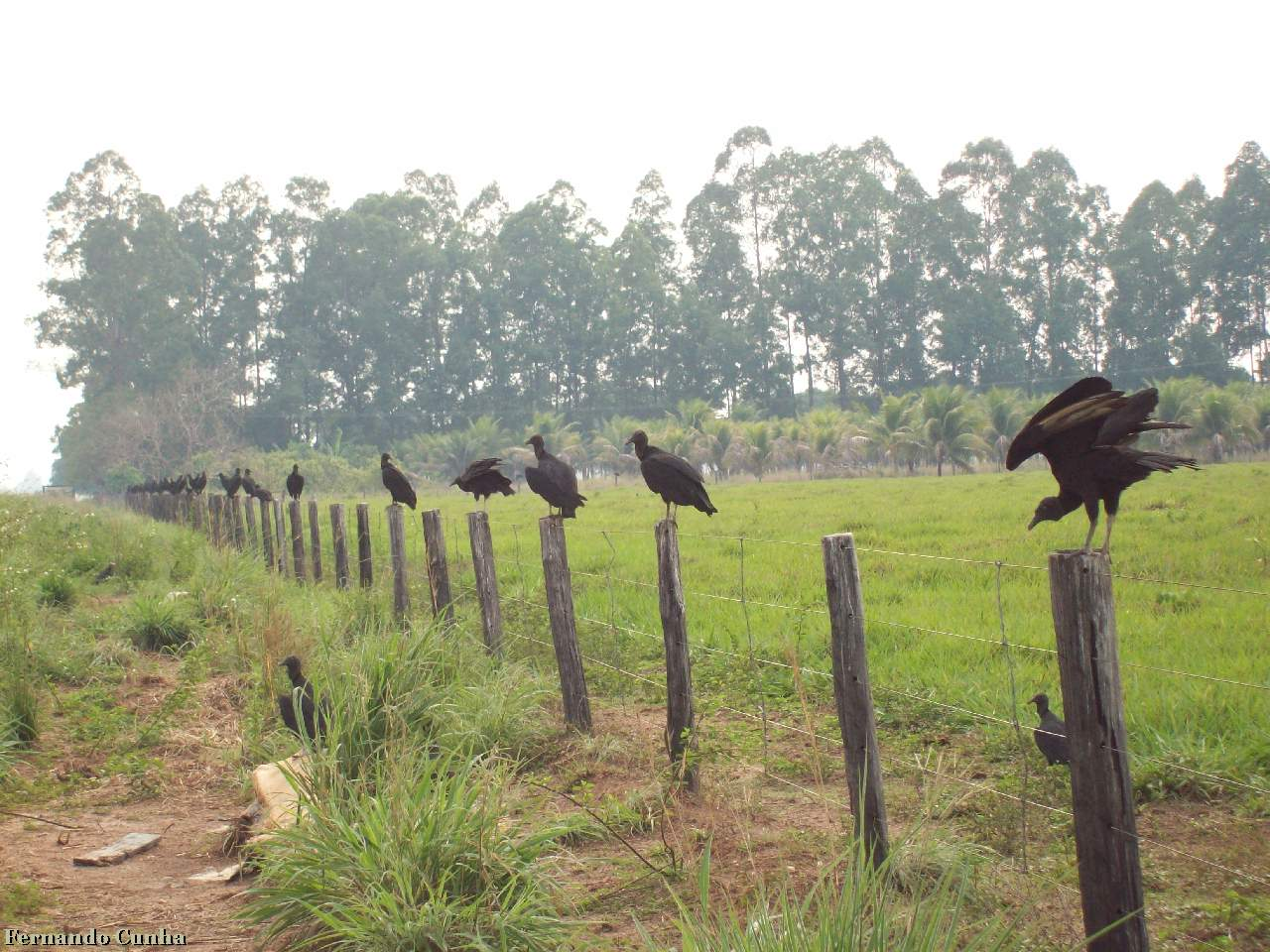 Urubus ao amanhecer na cerca de uma fazenda em Vila Nova dos Martírios - MA.